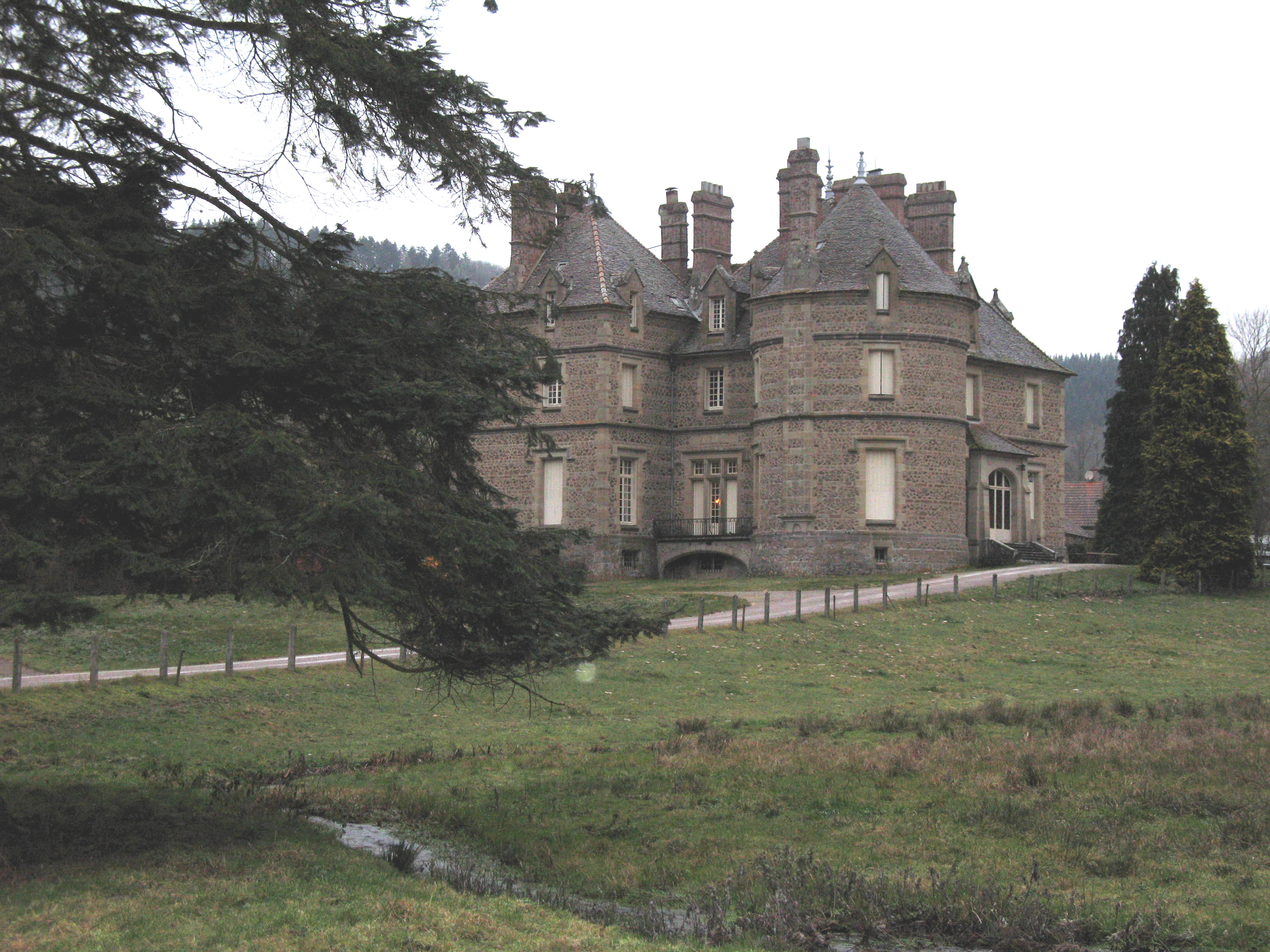 Le nouveau château de Visigneux à Lucenay-l'Evêque (Saône-et-Loire)